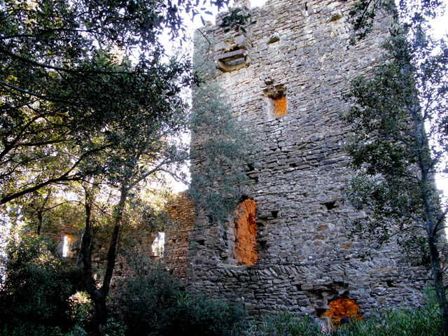 Castell de Montagut a la comarca del Gironès - Catalunya